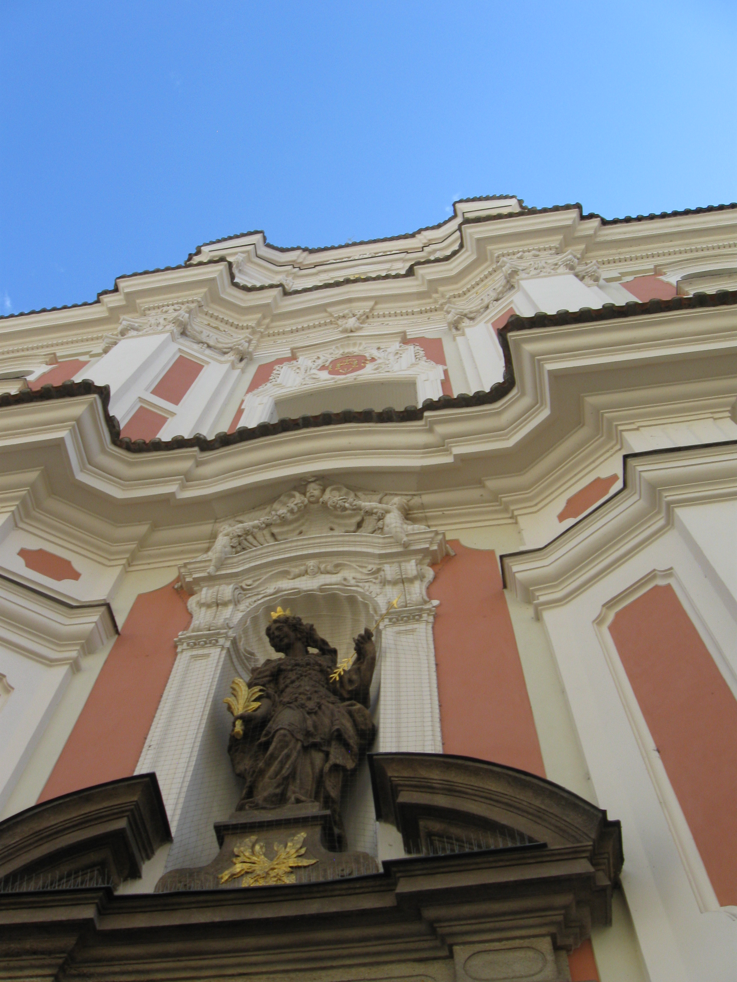 Klášter voršilek (Nové Město), Praha 1, Národní 139/8, Nové Město